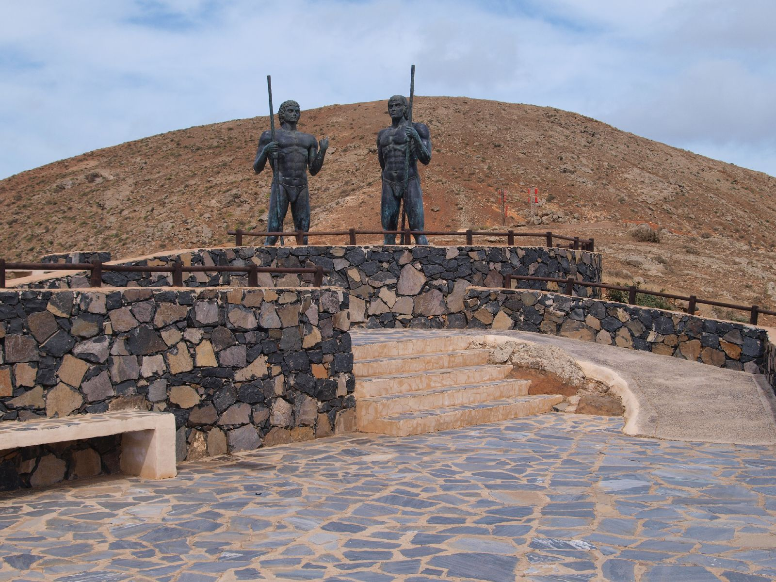 Betancuria, 35637, Las Palmas, Spain